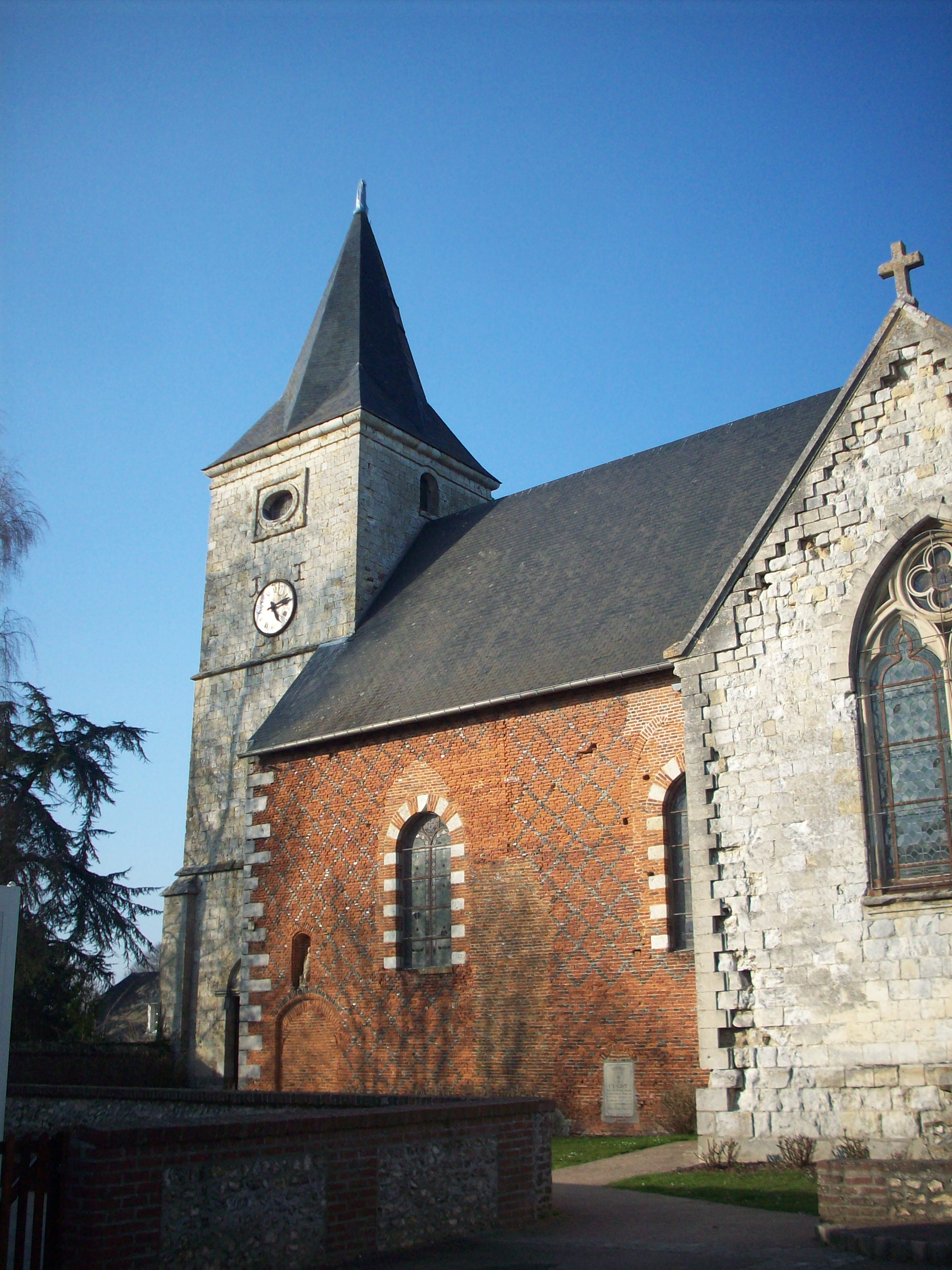 Détail de l'église Saint-Victor.